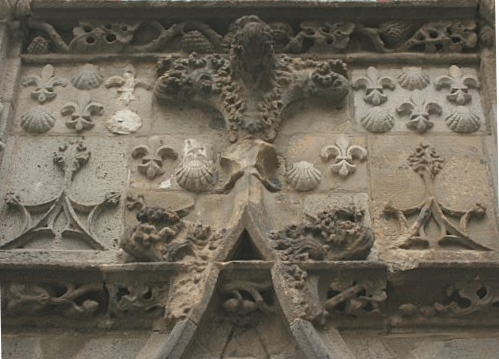 Tympan du portail de la maison consulaire d'Aurillac.